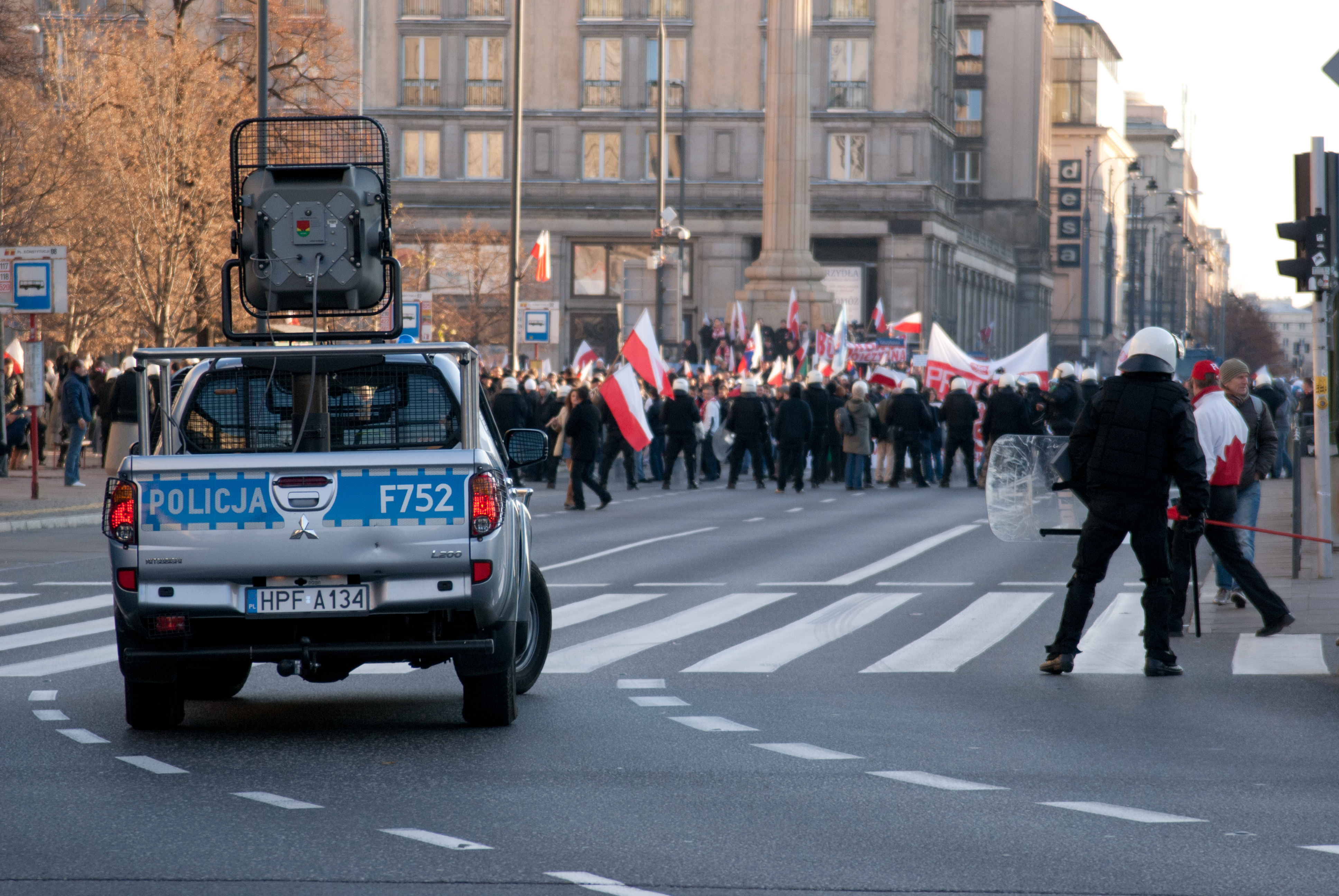 Policyjne Mitsubishi L200 z zainstalowanym systemem dźwiękowym LRAD-500X. Warszawa, Marsz Niepodległości 2011, Plac Konstytucji